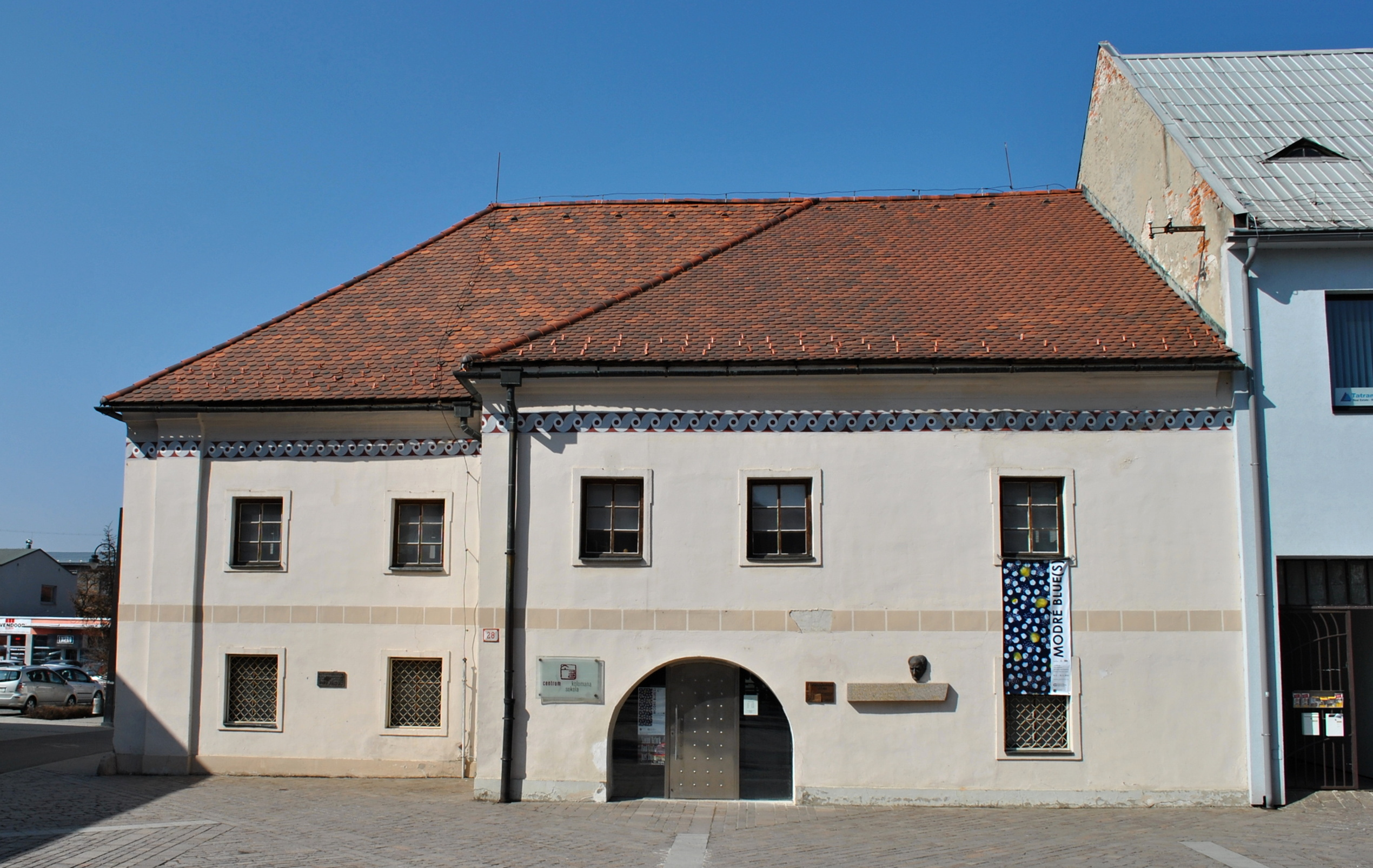 Kúria